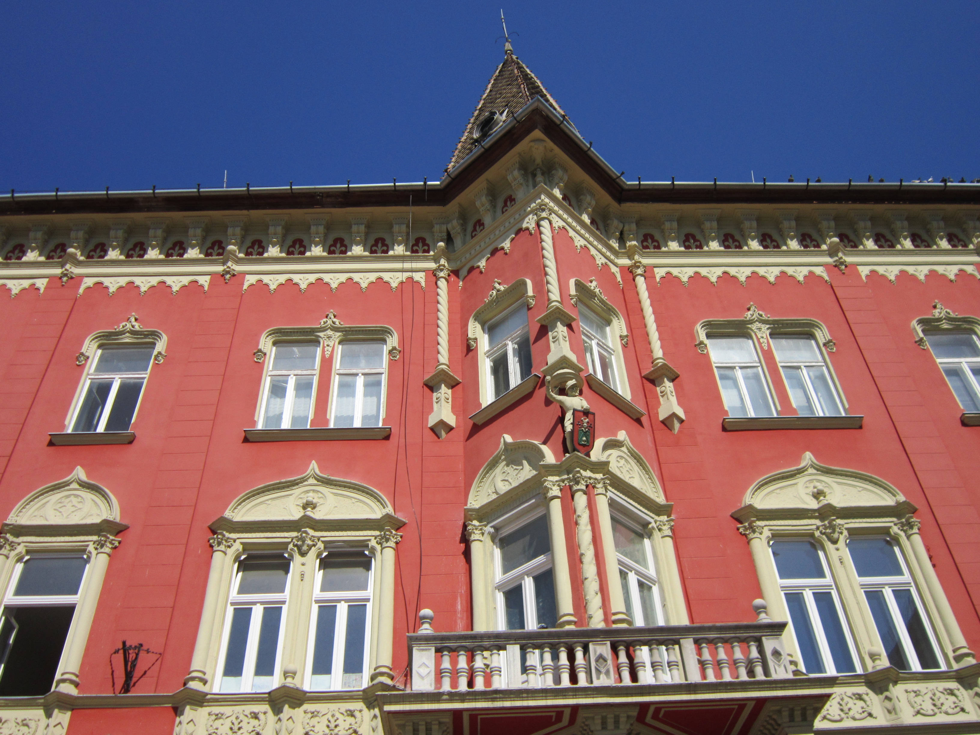 Војнића палата , Корзо 1 , Суботица